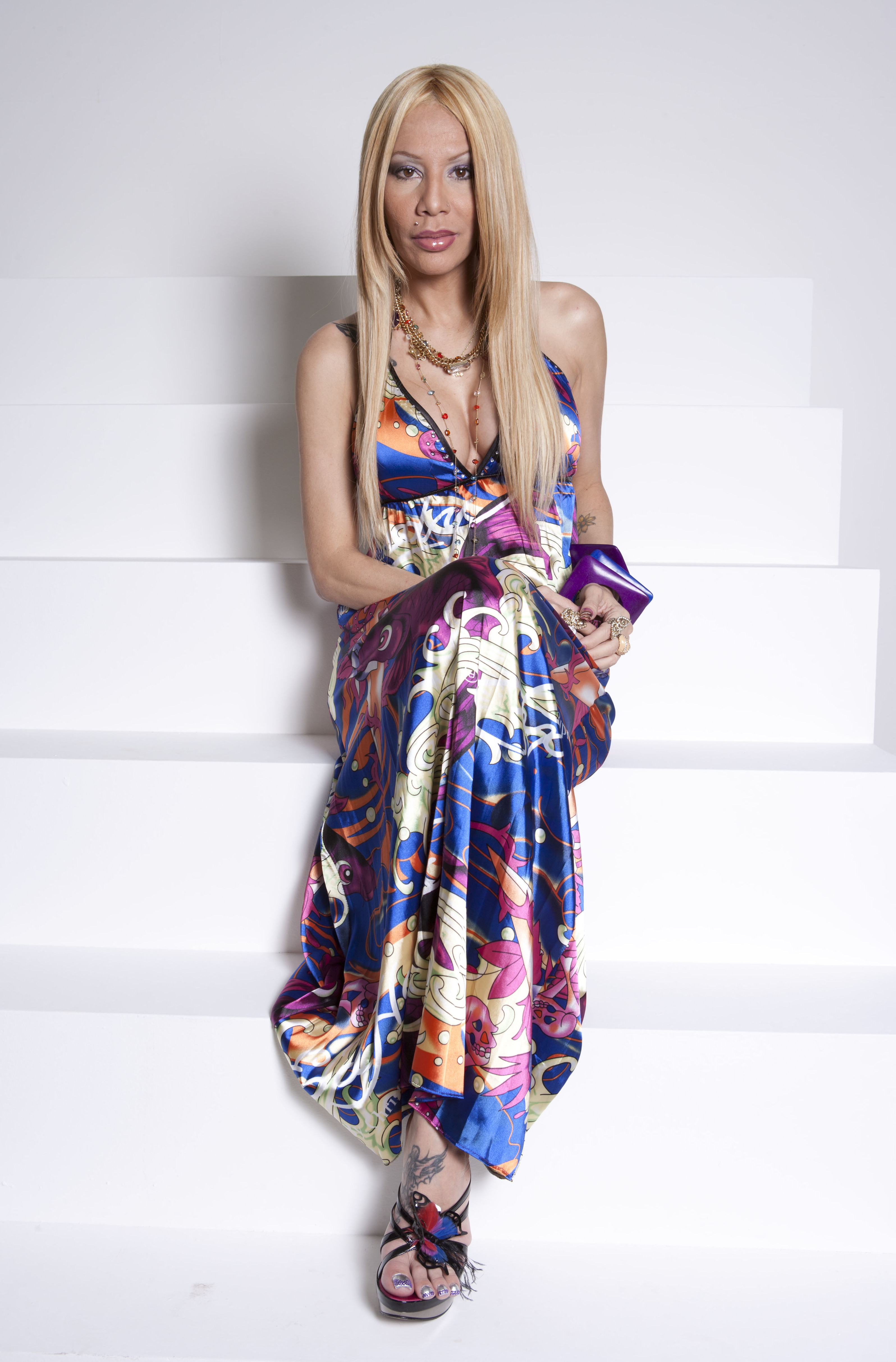 Ivy Queen on set